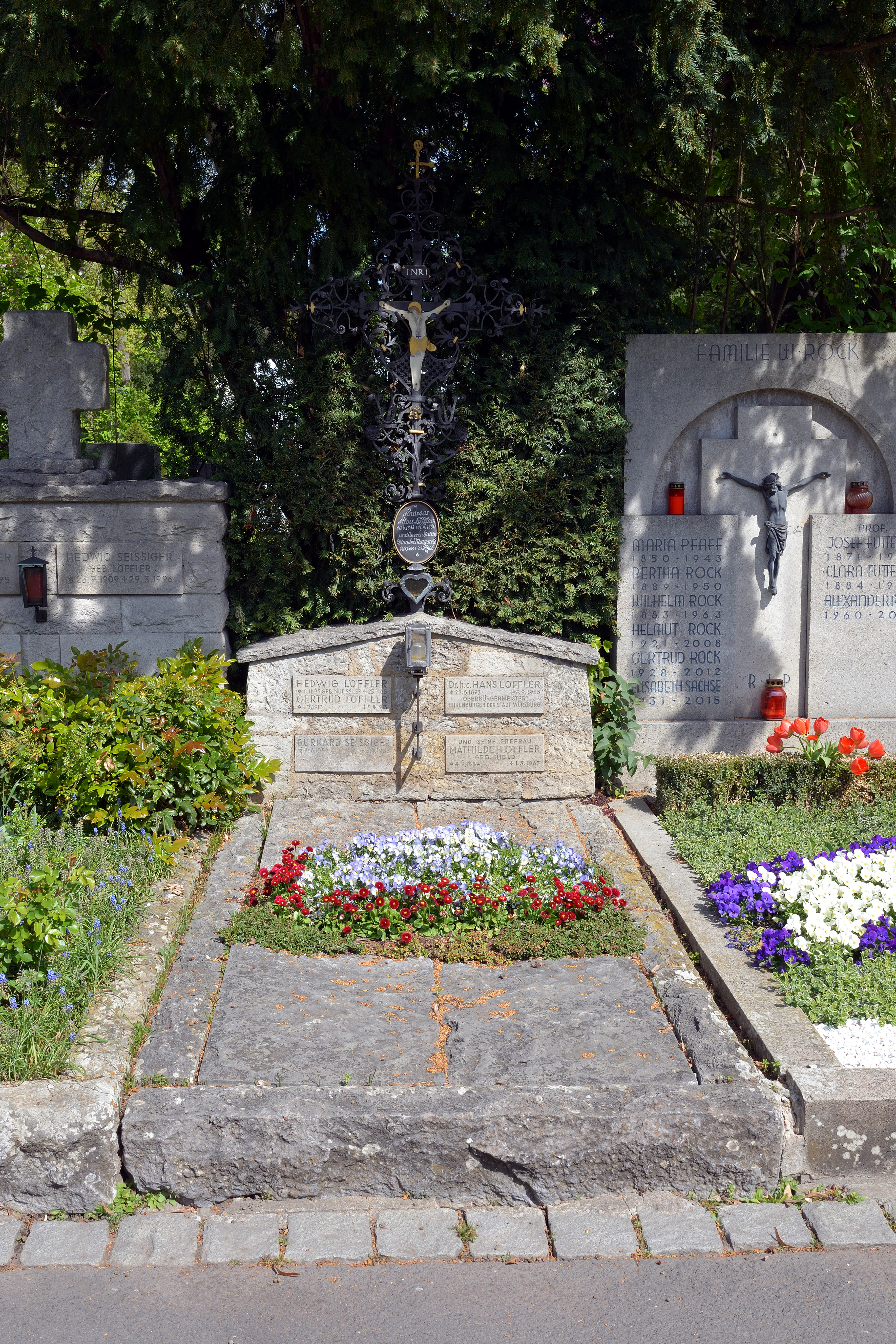 Impressionen vom Hauptfriedhof Würzburg Grab von Hans Löffler